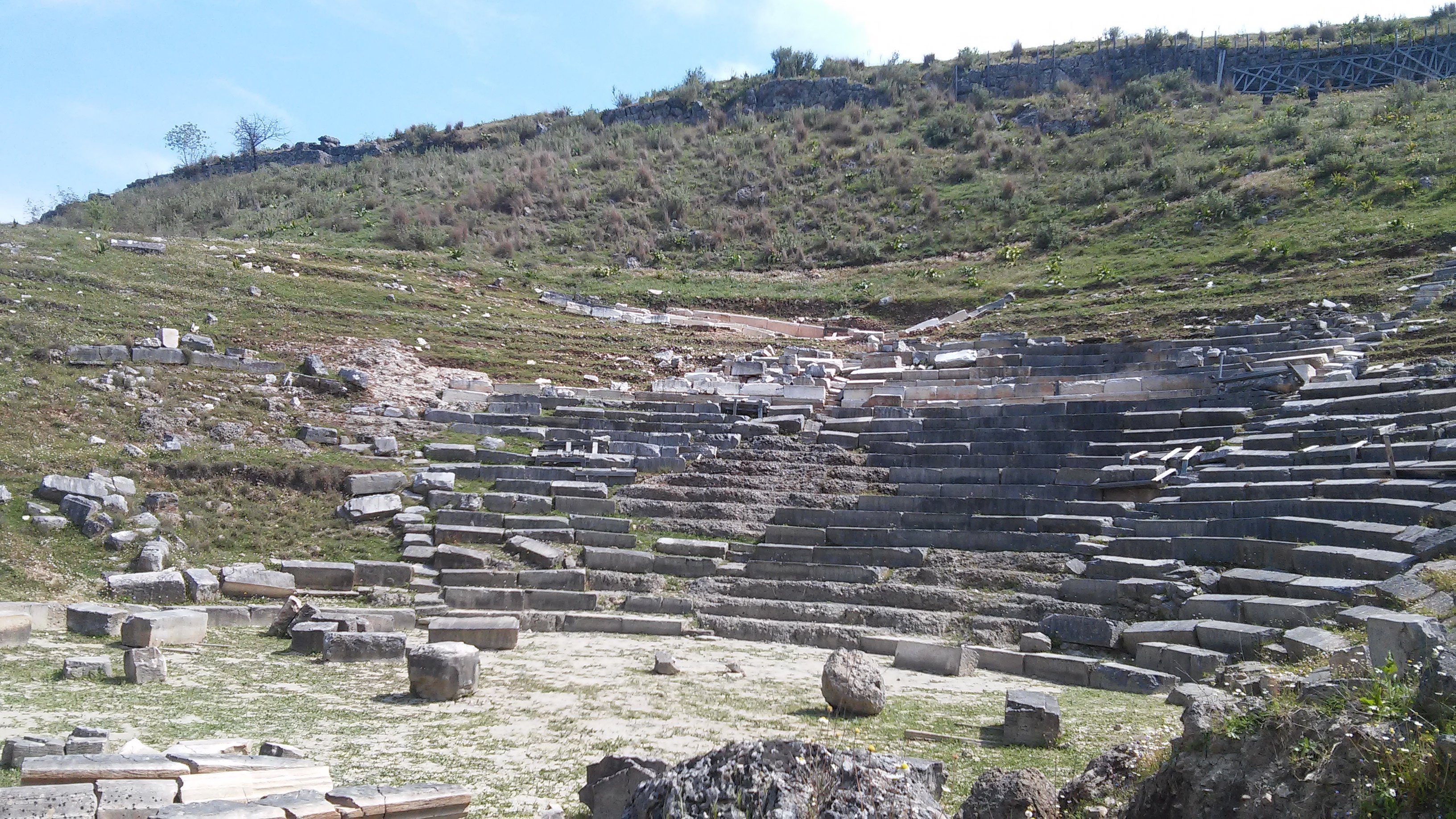 Αρχαία Γίτανα, άποψη θεάτρου